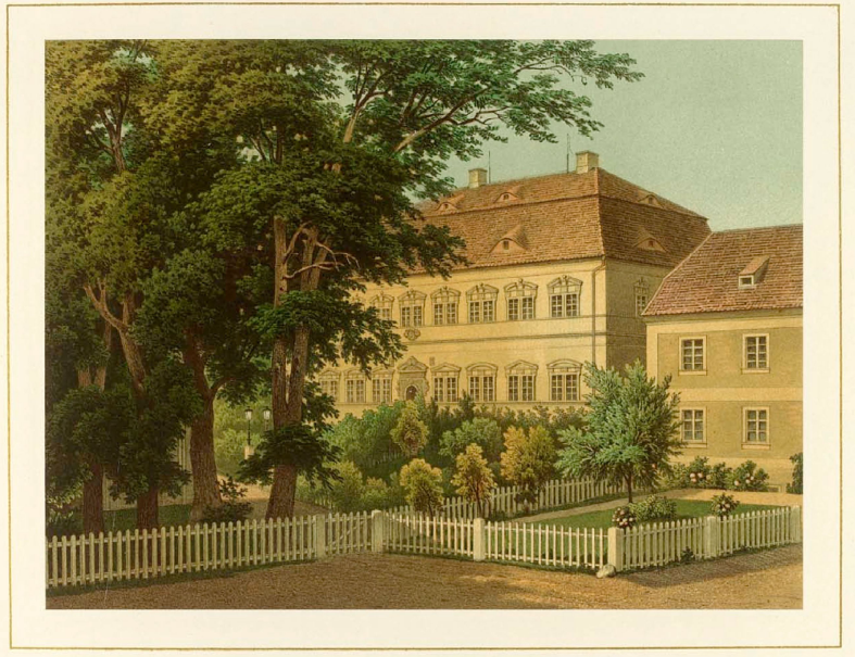 Gut Pilgrimsdorf, Provinz Schlesien, Kreis Goldberg